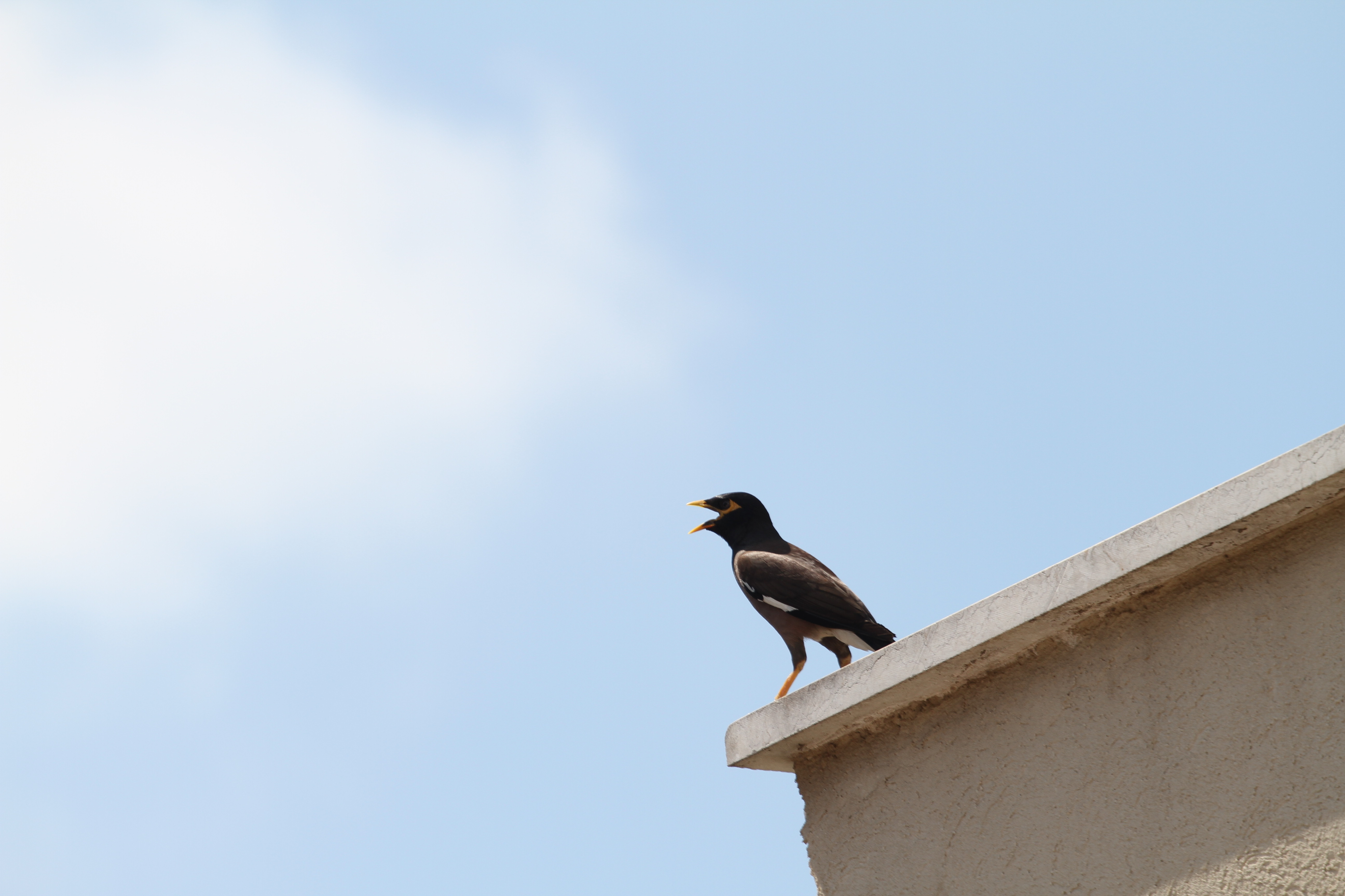 מינה מצויה